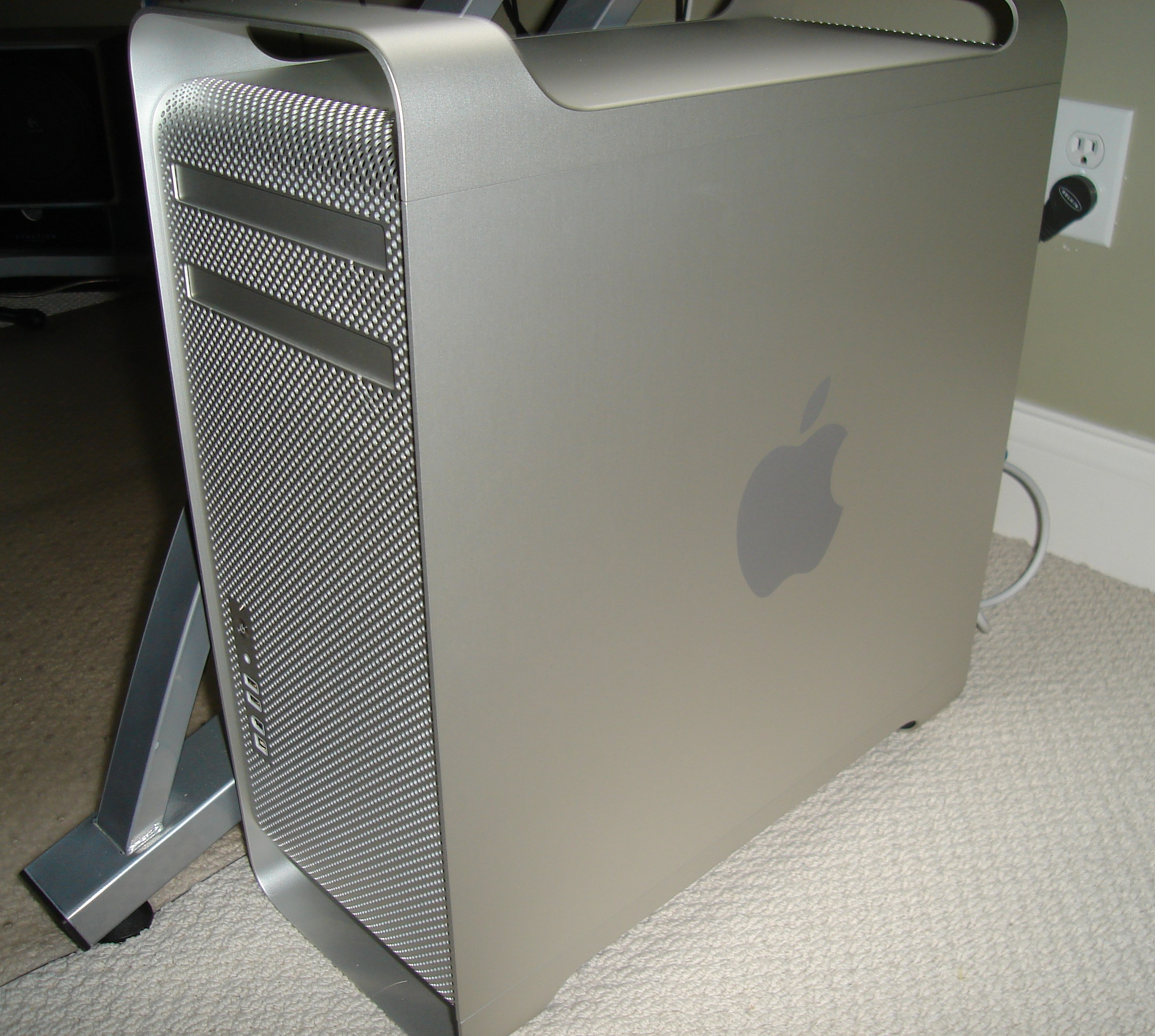 Mac Pro TowerMac Pro Tower